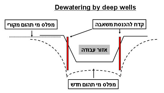 בארות עמוקים